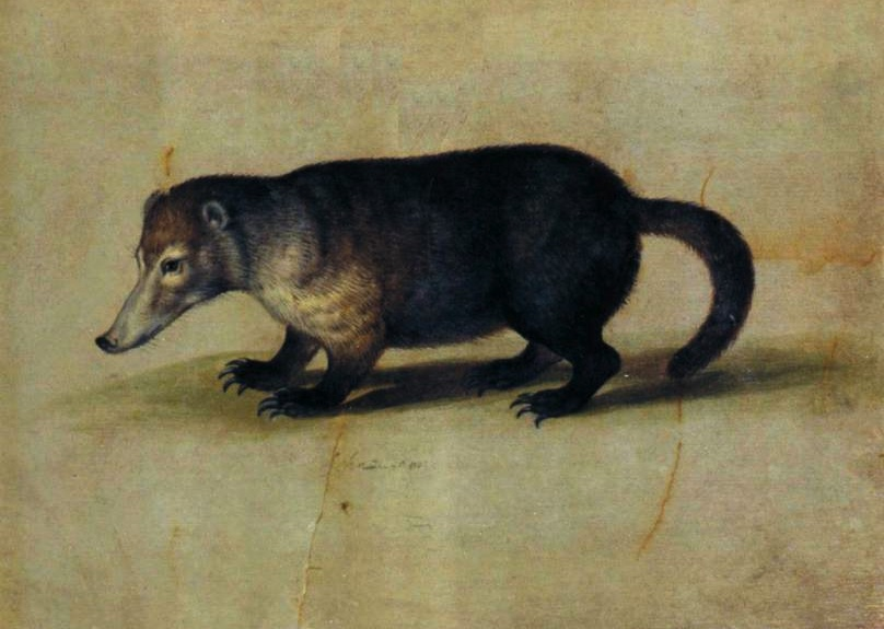 Coati des montagnes ou Coati nain (Nasuella olivacea)